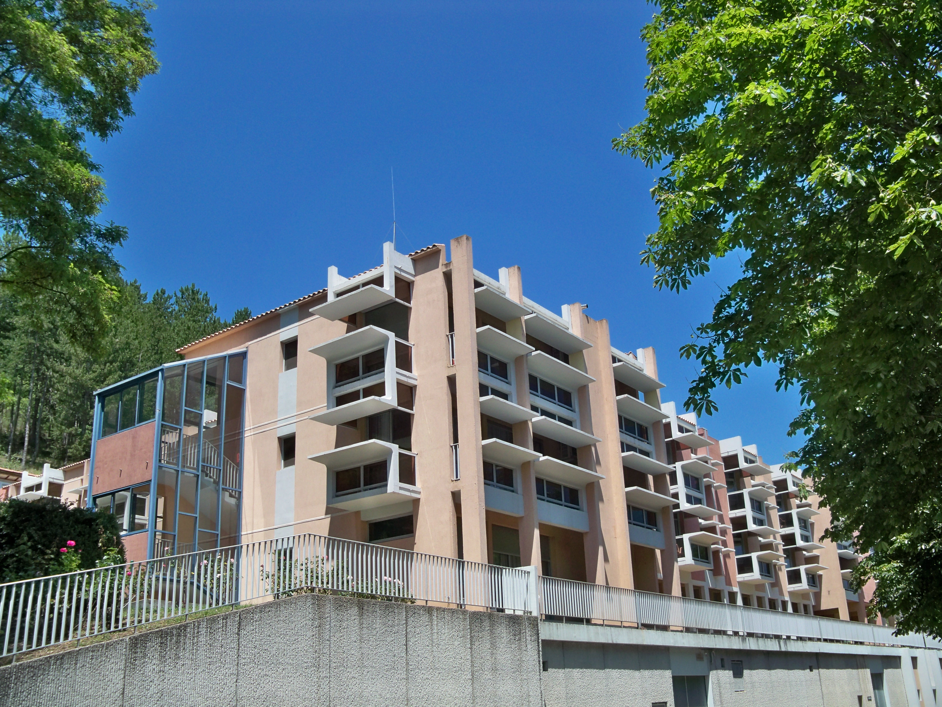 Hopital et maison de repos de Banon (04)